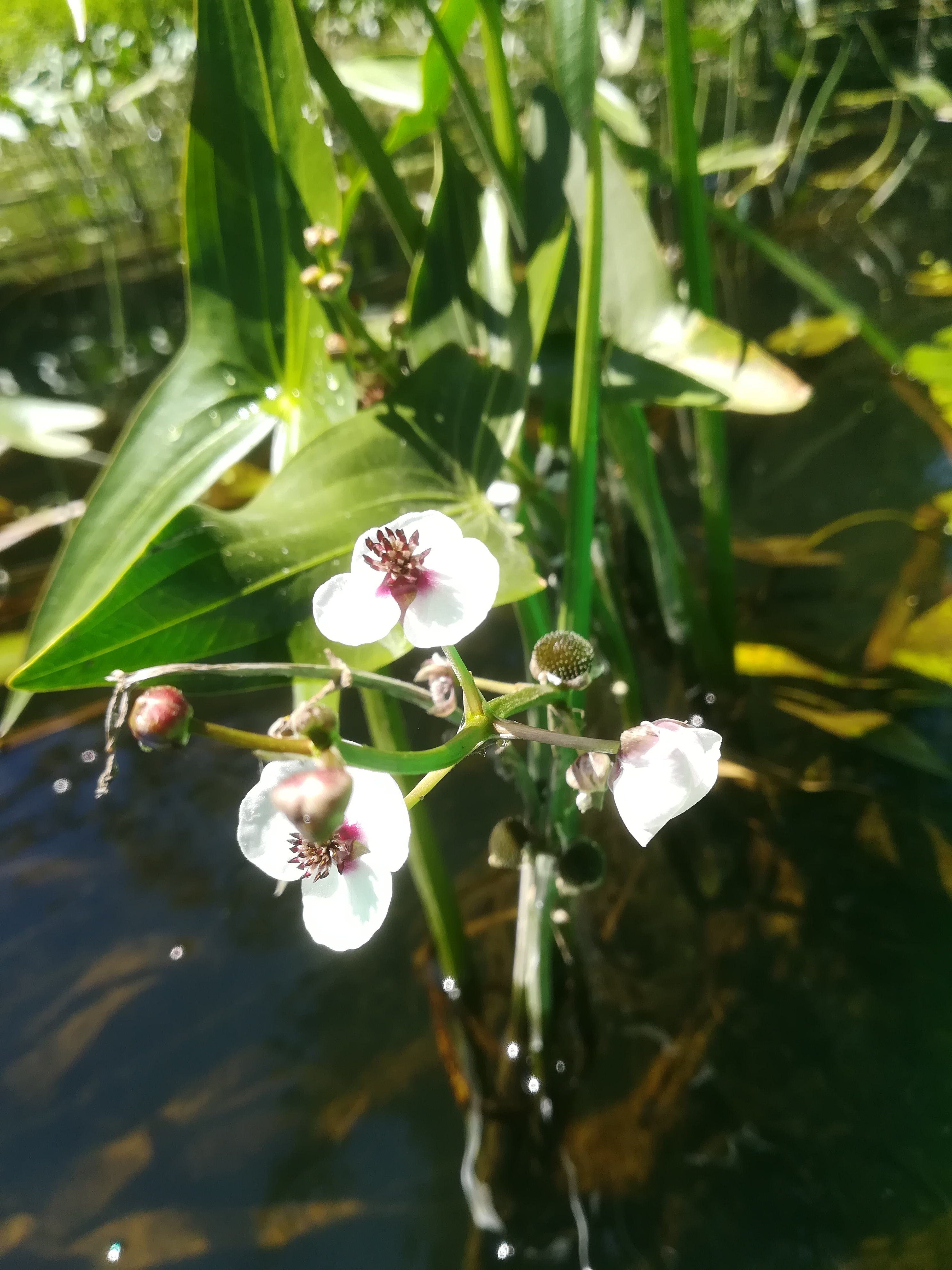 Kanał Kościański w Kościanie.